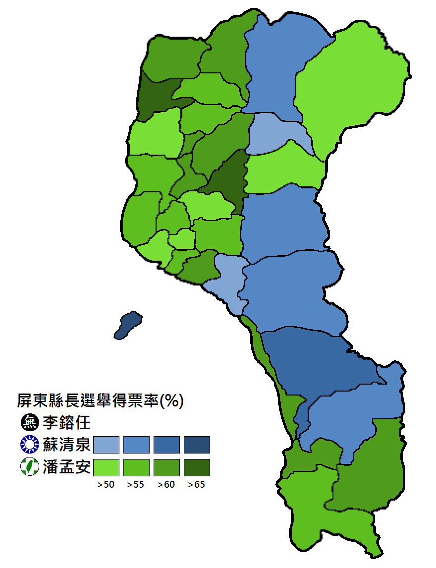 中文（台灣）: 屏東縣長選舉得票分布。